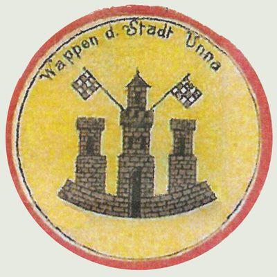 Altes Wappen der Stadt Unna von einer Postkarte von 1898